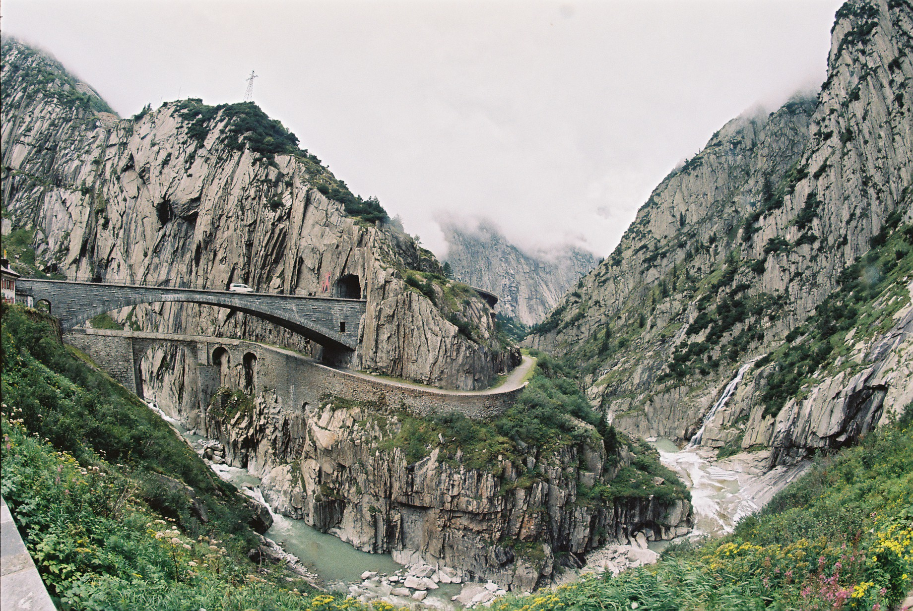 Pont du diable sur la route du col du Gotthard. film: portra 160nc